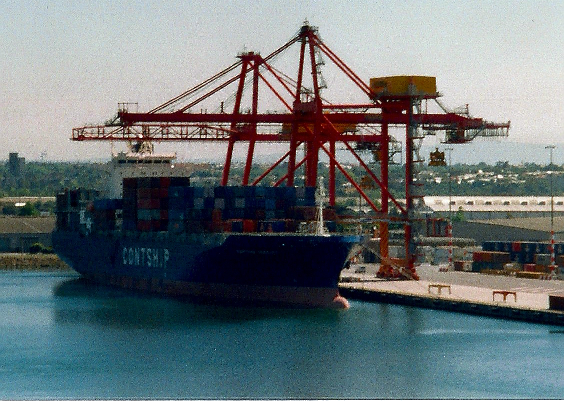 Hafen Melbourne Australien